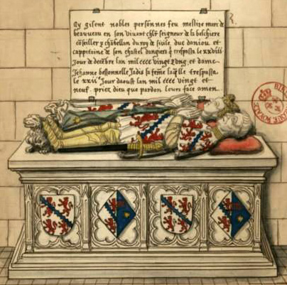 images collectées pour Gaignières se trouvant à la BNF numérisés par Gallica.